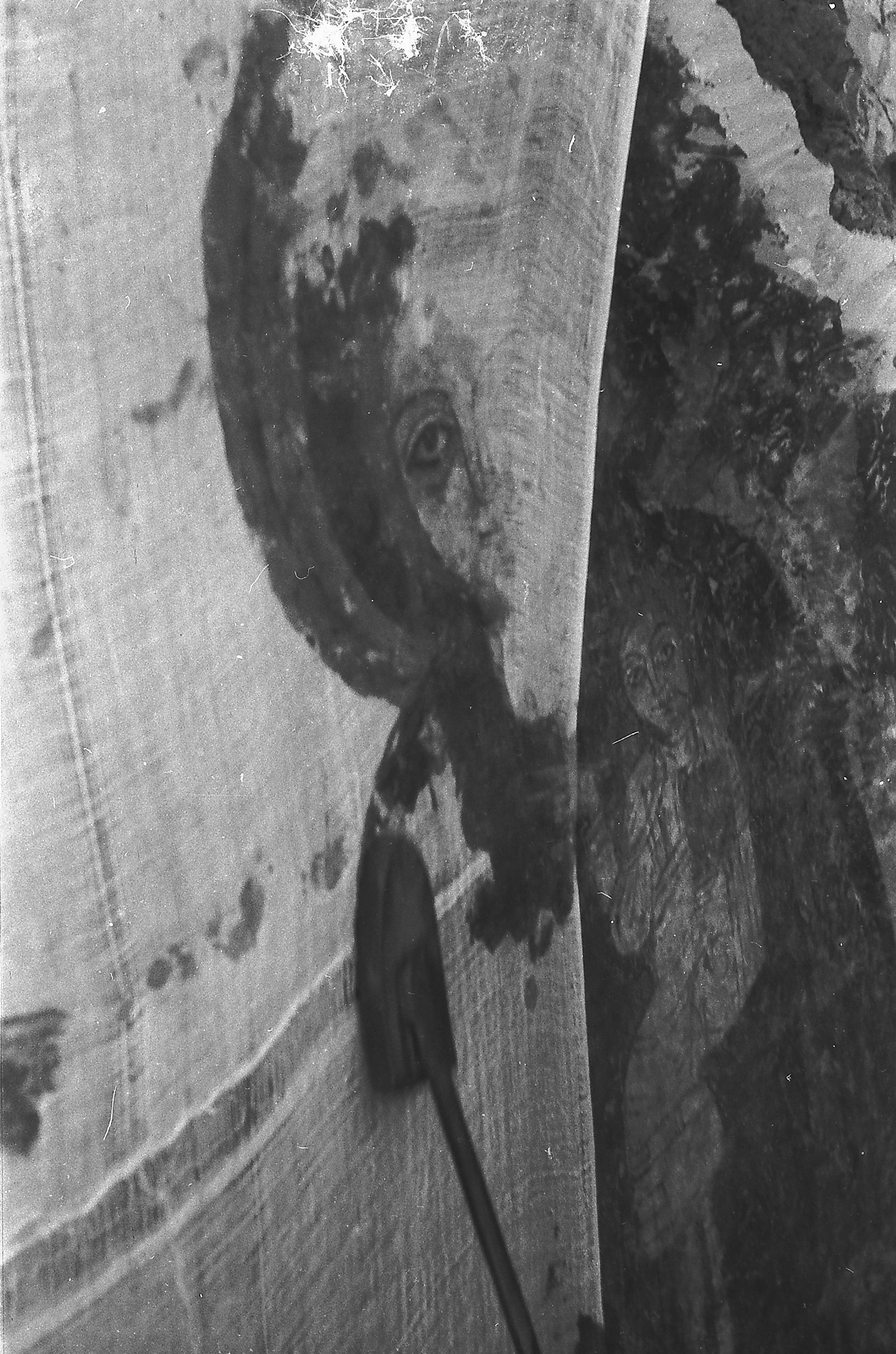 Wykopaliska w Faras